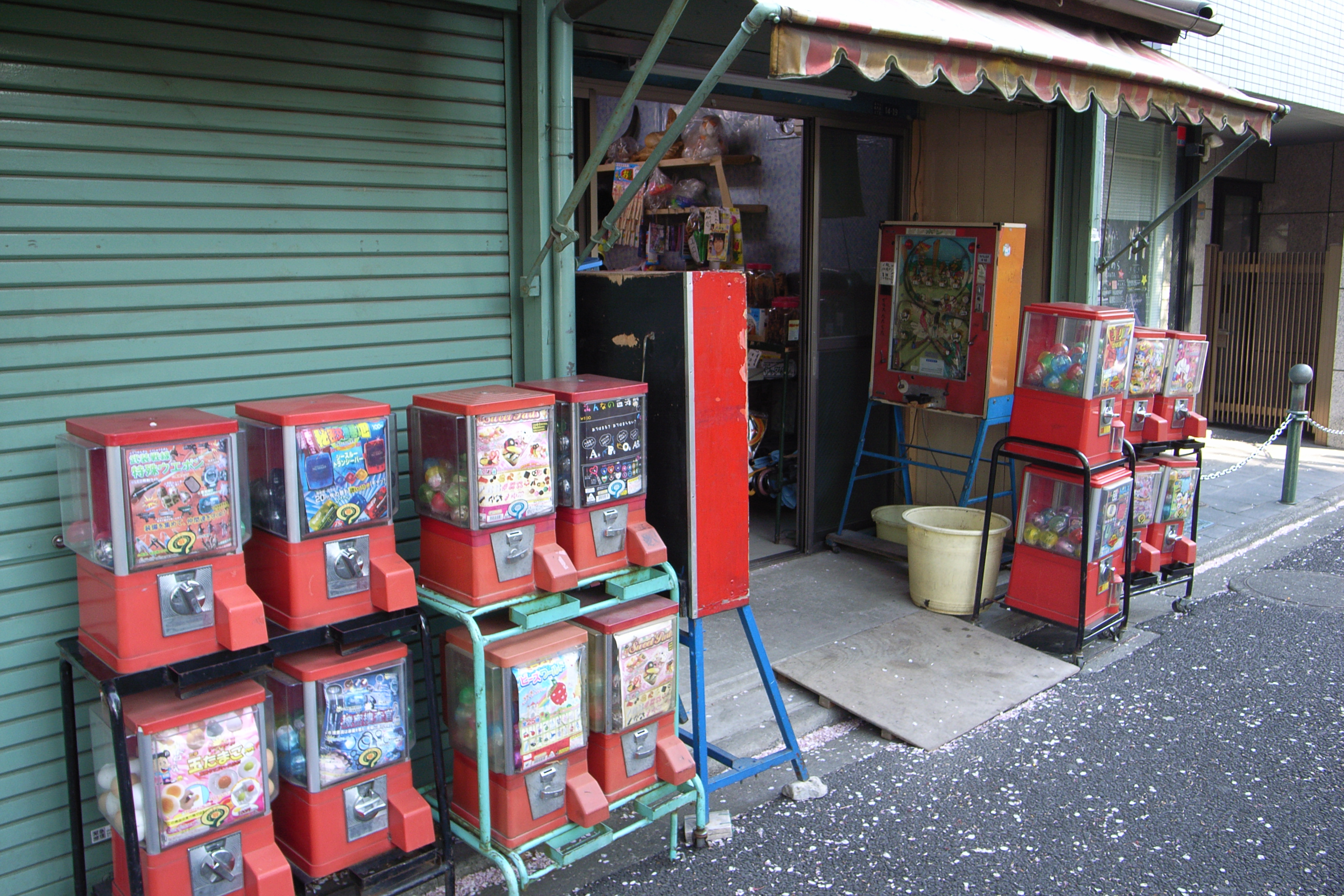 駄菓子屋さん